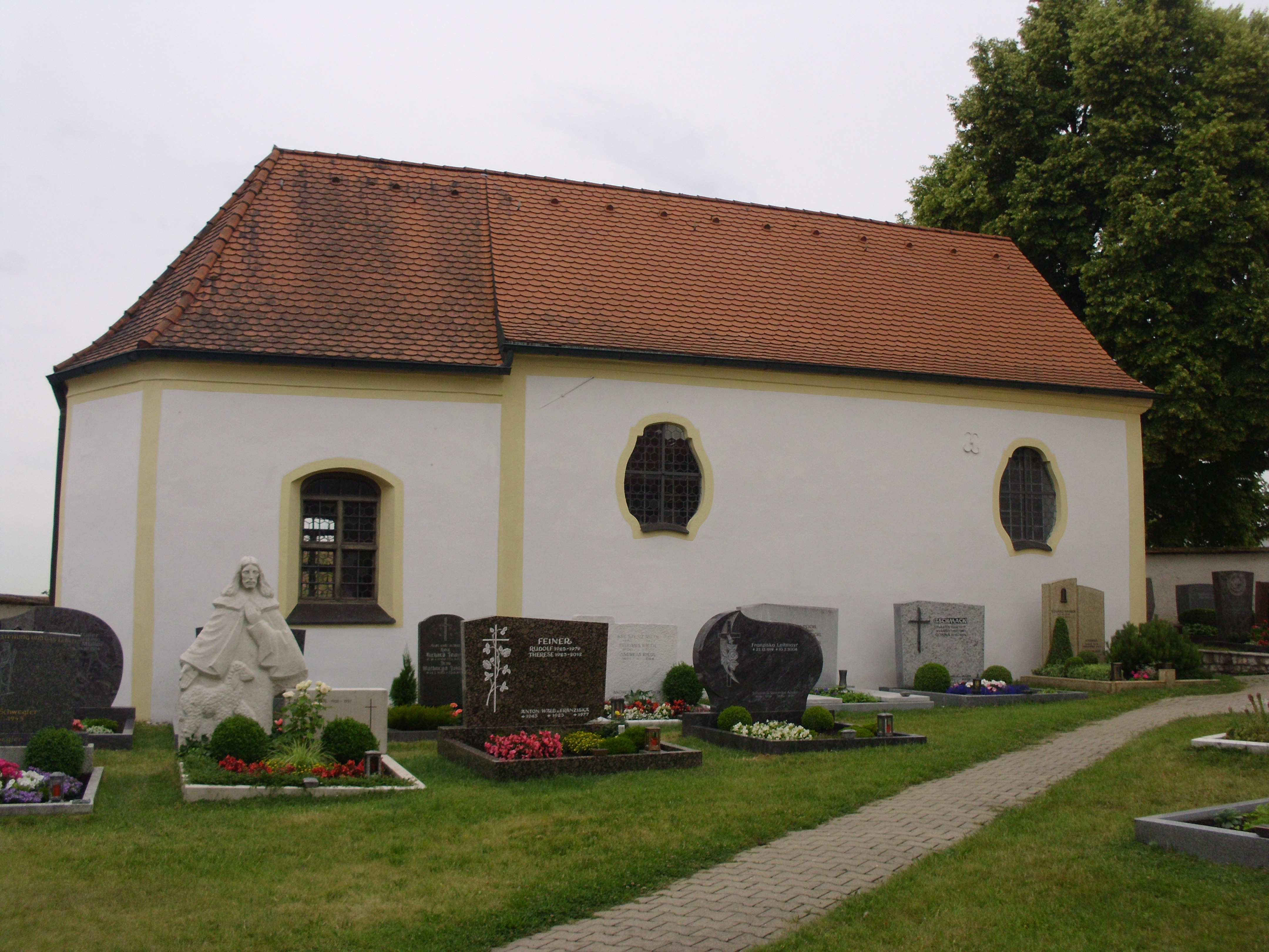 Bergheim im Landkreis Neuburg-Schrobenhausen, Marienkapelle, Nordseite